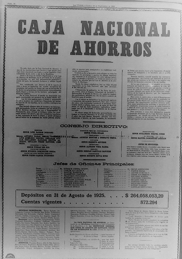 Aviso publicitario de la Caja Nacional de Ahorros de Chile en 1925.